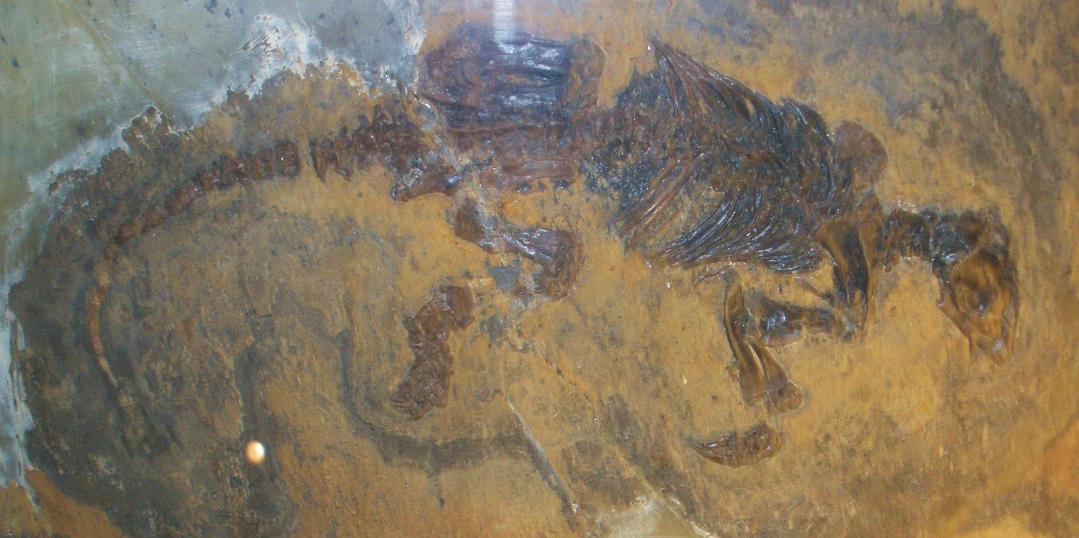 Fossil of Eomanis, an extinct pangolin Took the photo at Musee d'Histoire Naturelle, Brussels